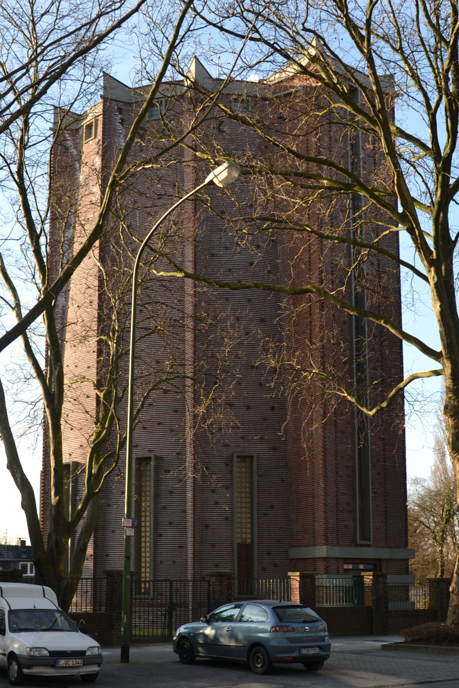 unter Denkmalschutz stehender Wasserturm in Essen-Frillendorf, Architekt: Edmund Körner